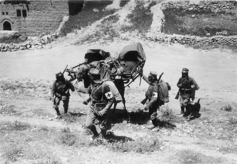 BuFA: Palästinafront. Verwundetentransport auf einem Kamel. II.Text Scherl: 1918. Von der Palästinafront. Verwundeten-Transport auf einem Kamel. 9405-18.